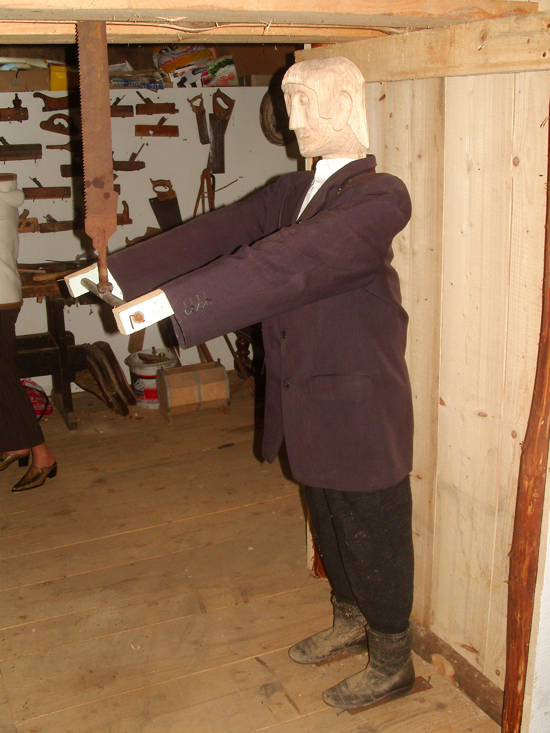 Prywatne Muzeum Wsi Pogórzańskiej, założone przez p. Mieczysława Skrzyszowskiego. Mieści się w zabudowaniach pod adresem: Bączal Dolny 10